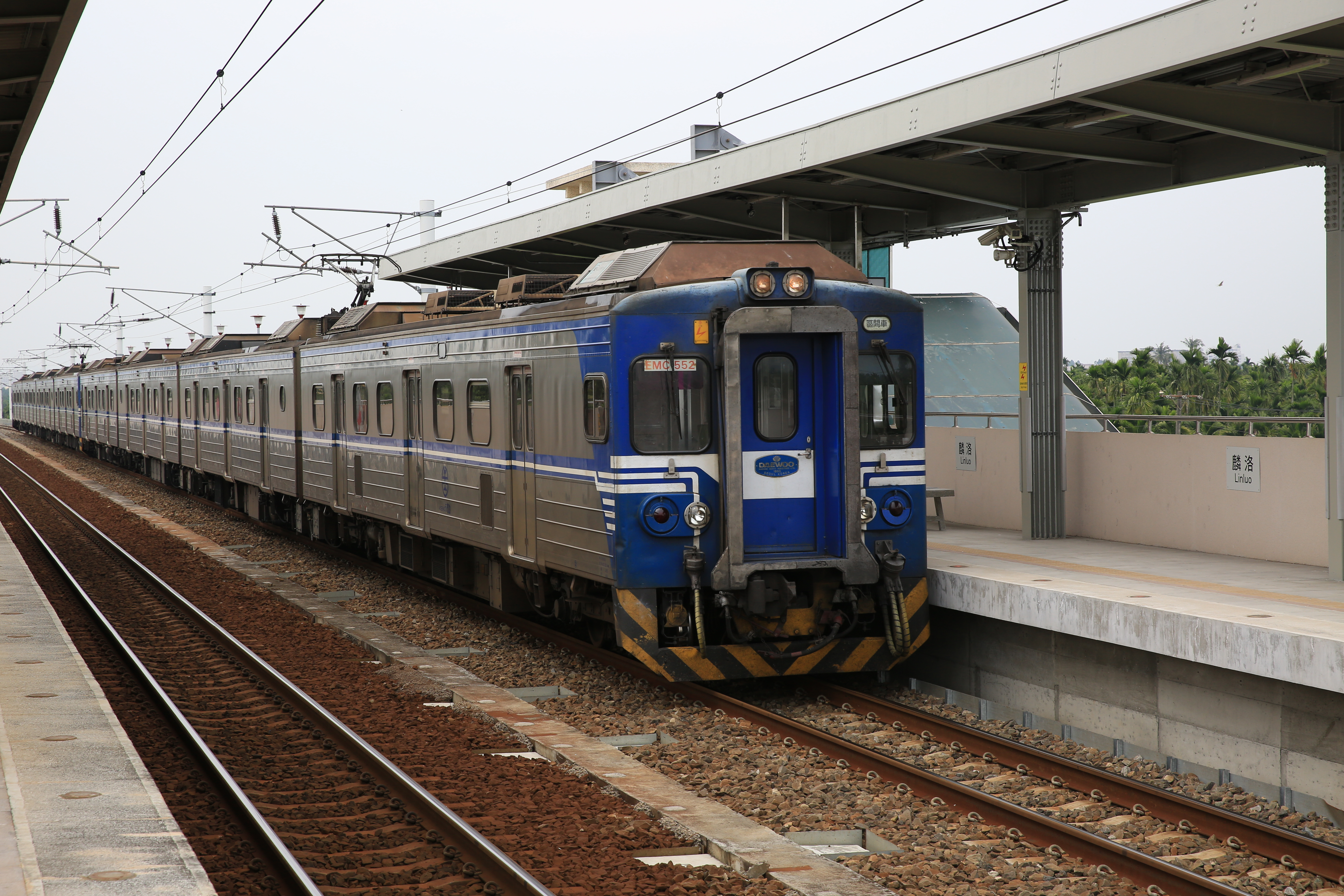 台鐵麟洛站月台，圖中列車為EMU552電聯車行駛3327次區間車(新左營-潮州)。